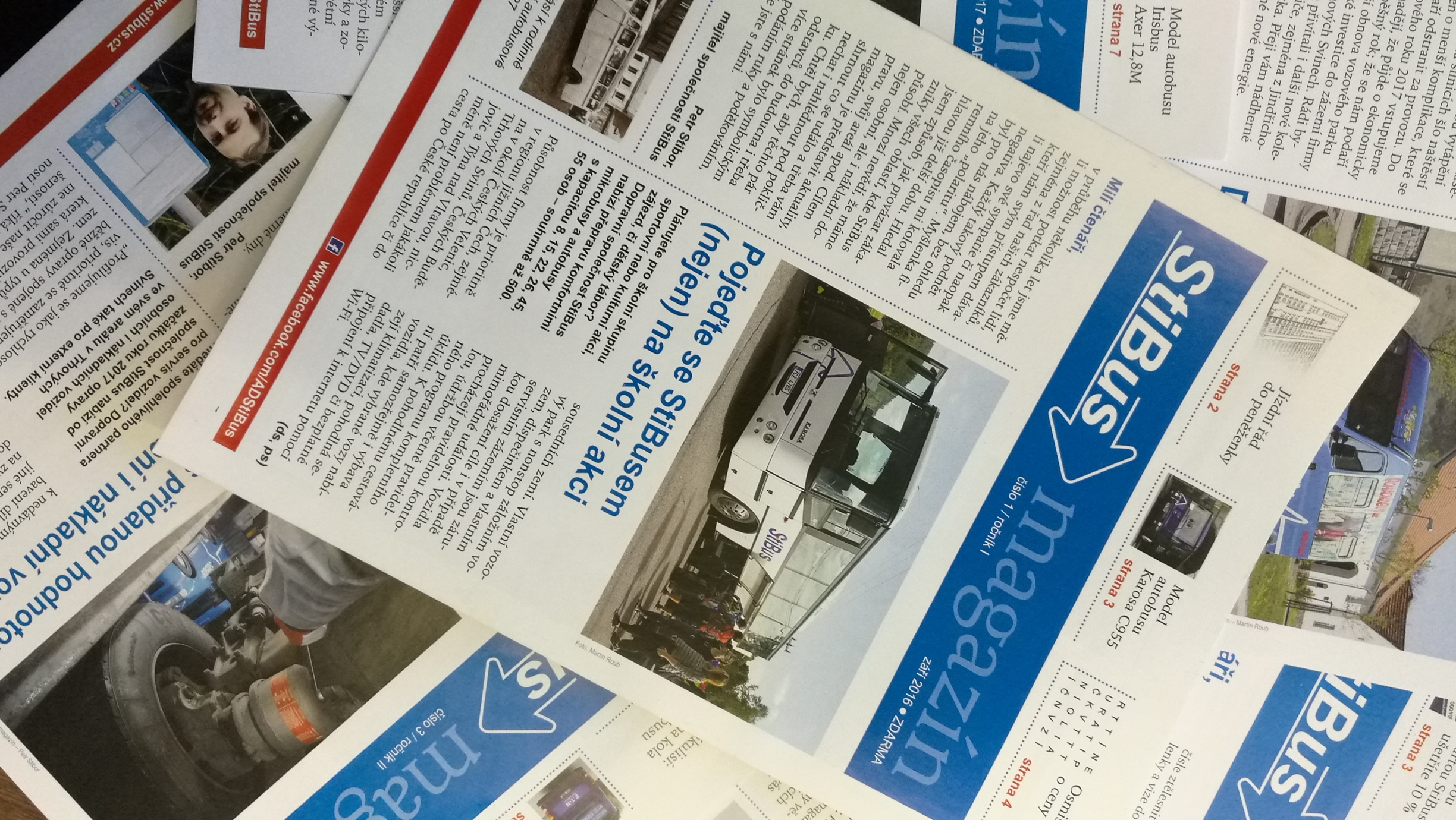 Dvouměsíční periodikum vydávané dopravcem StiBus od 9/2016